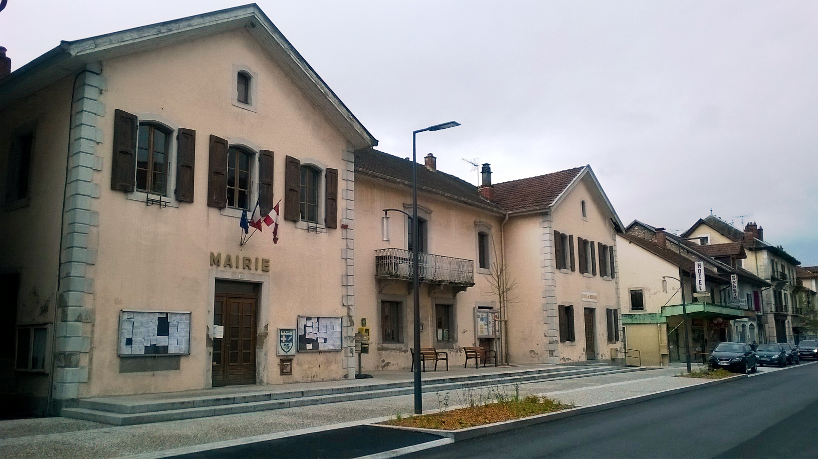 Frangy (Haute-Savoie, France) Mairie (ancienne école de garçons).